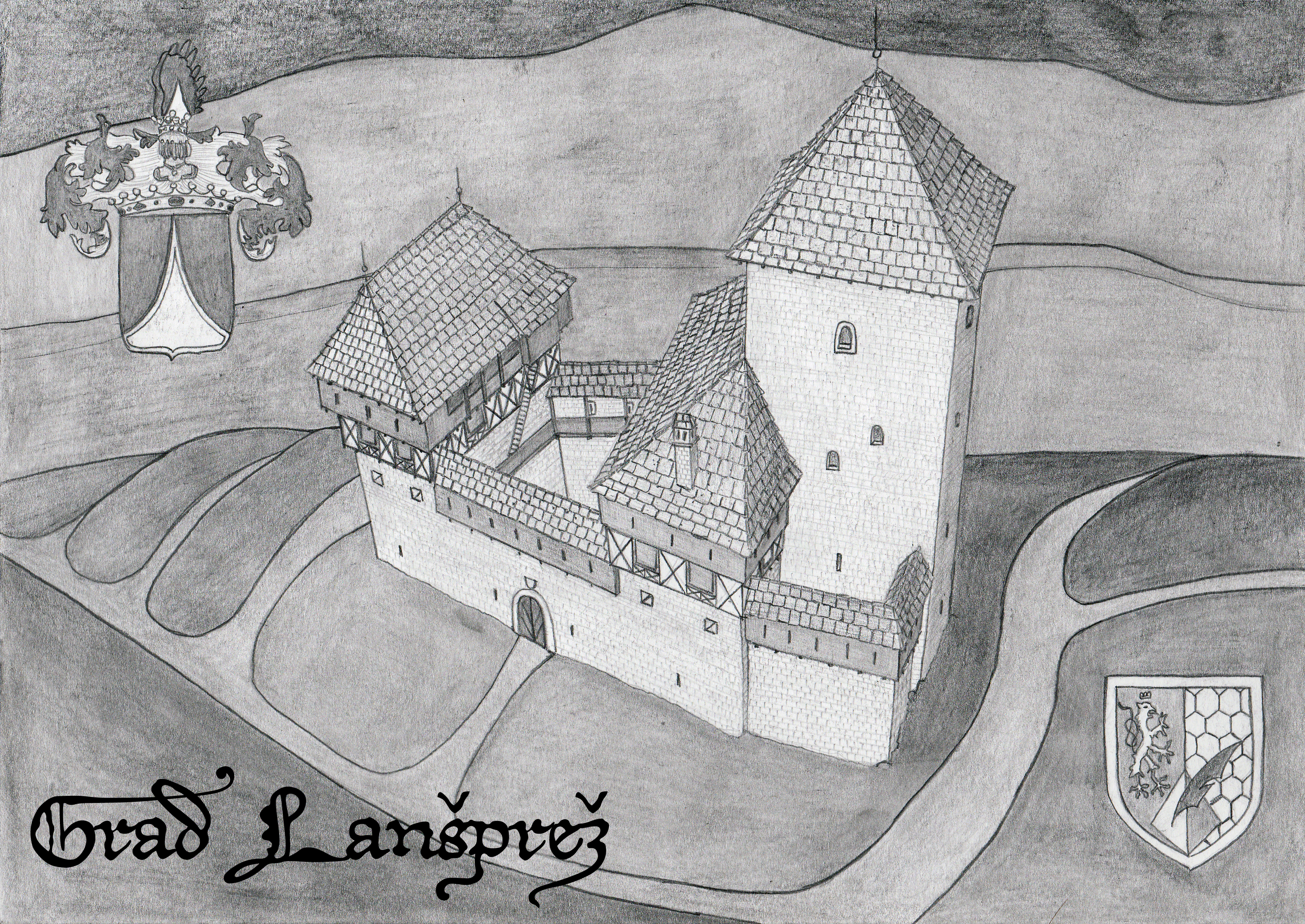 Poskus rekonstrukcije gradu Lanšprež iz 15.stol. Grb zgoraj levo: Lastniki Gallenbergi iz 15.stol. Grb spodaj desno: na podlagi slike Bogdana Breznika, kot predlog za grb občine Trebnje.